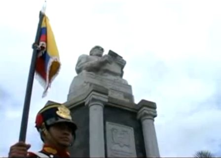 Monumento a Luis Alberto Costales Cazar, ubicado en la ciudad de Riobamba Ecuador, realizado por el artista Eddie Crespo